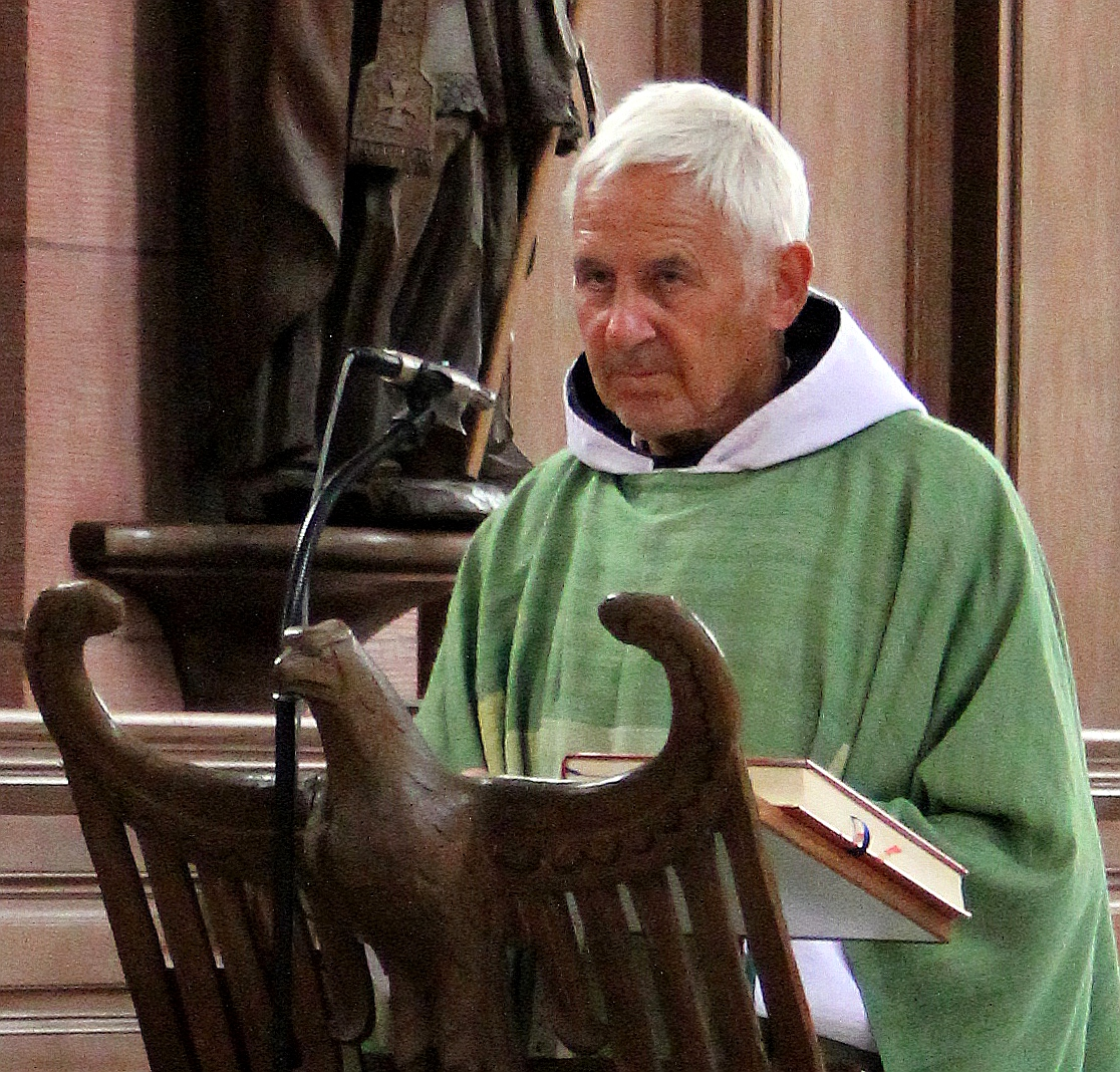 Pater Stephan Reimund Senge, 2011 Administrator der Abtei Himmerod